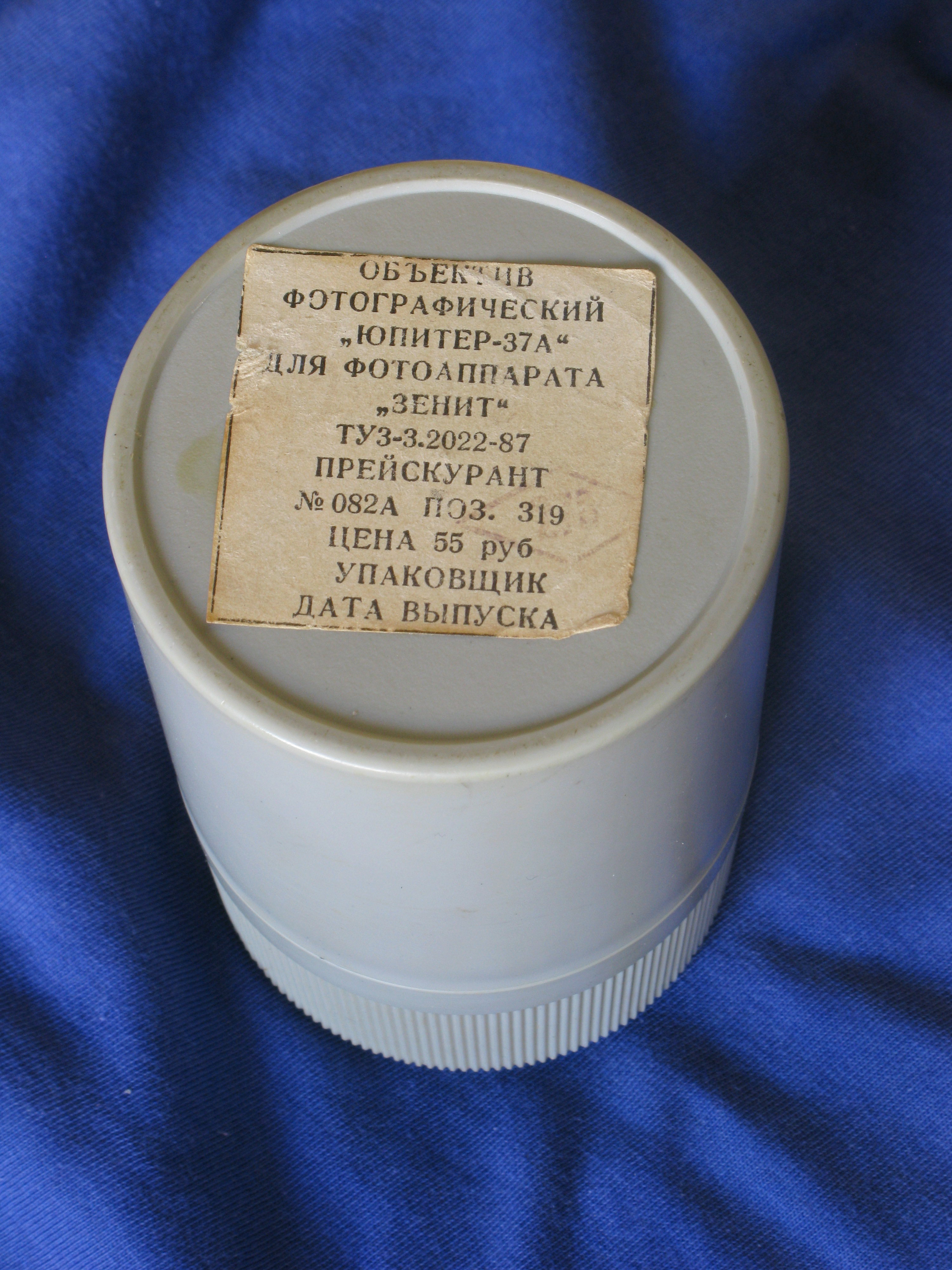 Estuche del objetivo Júpiter-37A 135mm 3,5